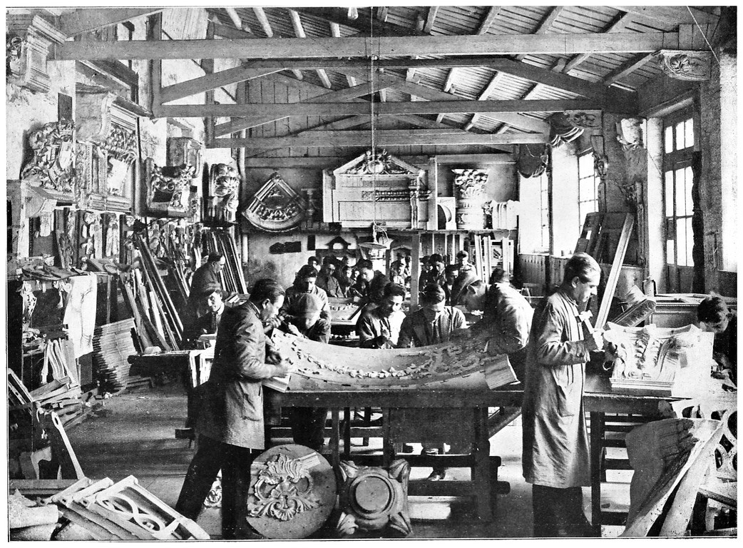 Immagine d'insieme del reparto intaglio del legno della Fabbrica di mobili Ducrot, Palermo, dicembre 1927, in La Sicilia e la sua attività industriale, estratto de L'Illustrazione italiana, 1927, 50 (AS Ragusa, Biblioteca, L/86)